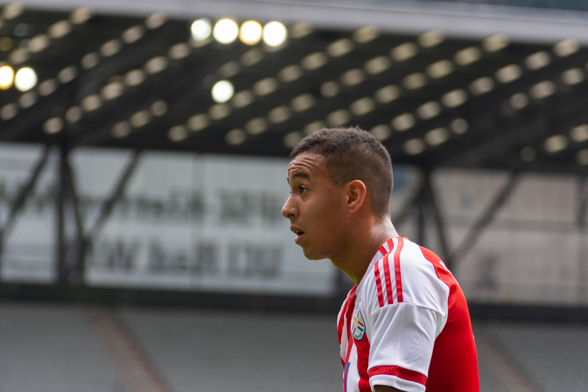 Alejandro Romero